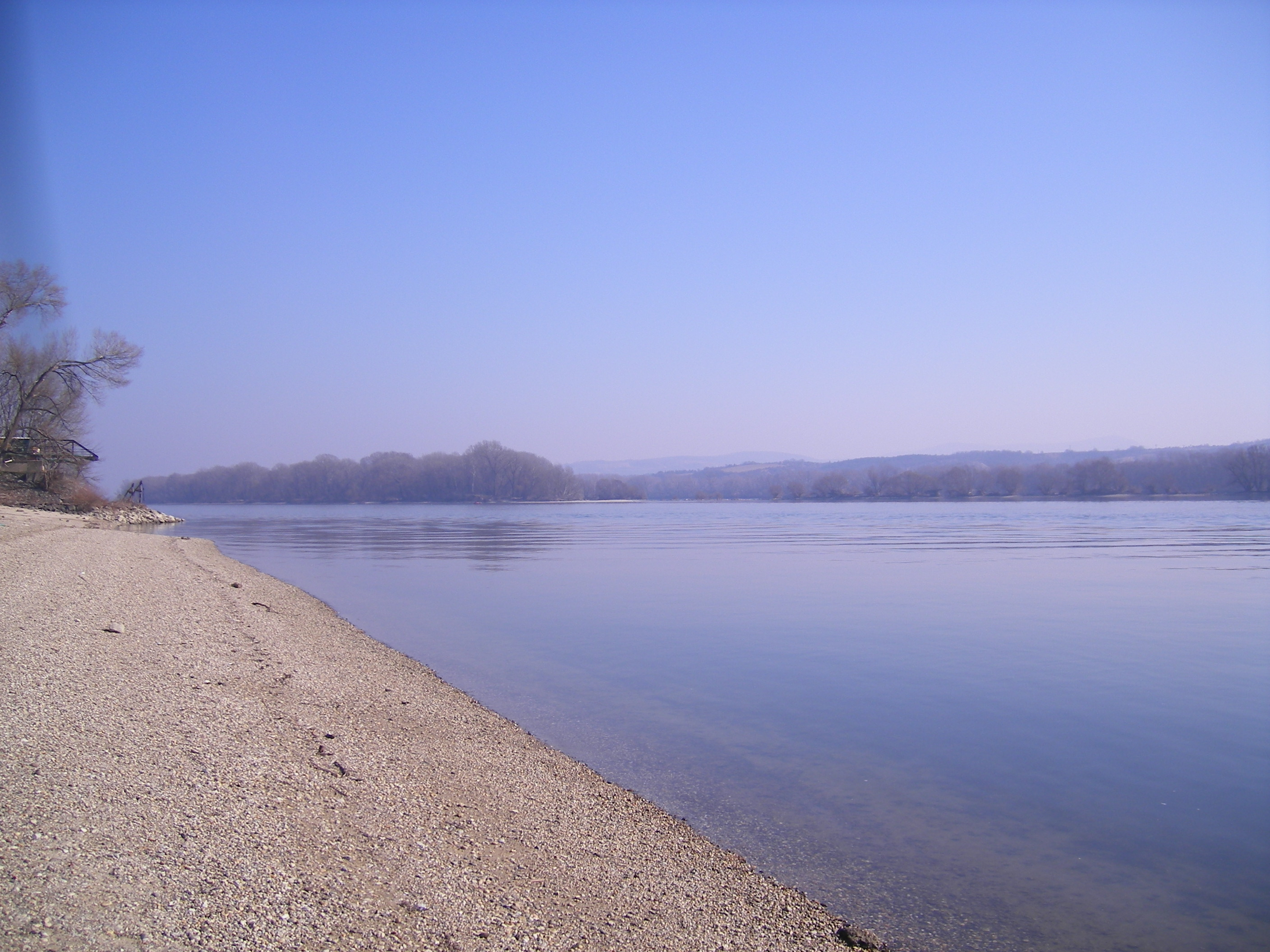 Dunaradvány - Duna-part